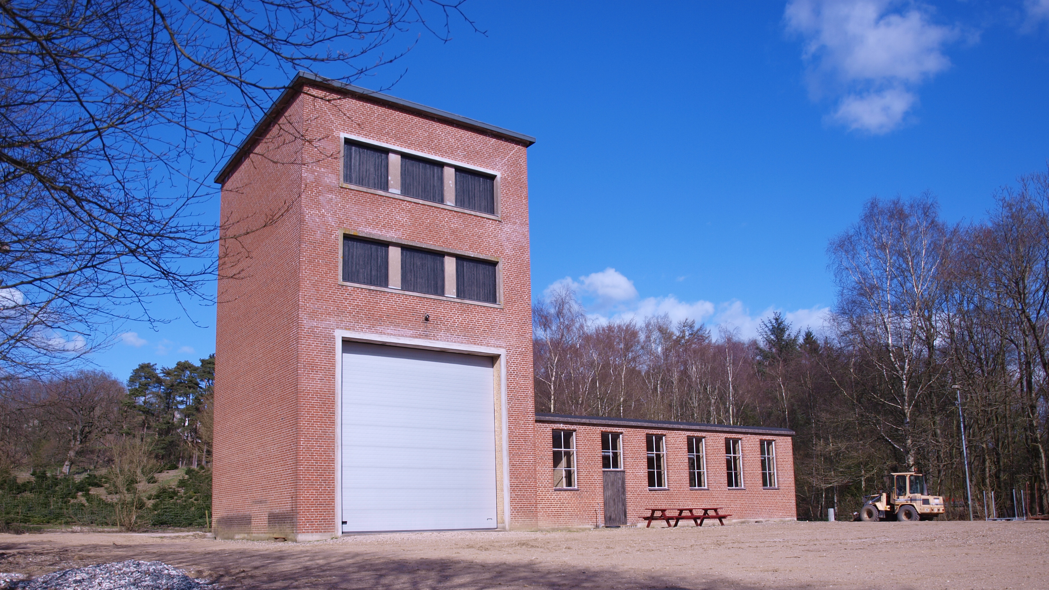 Bygning bag ved Harteværket